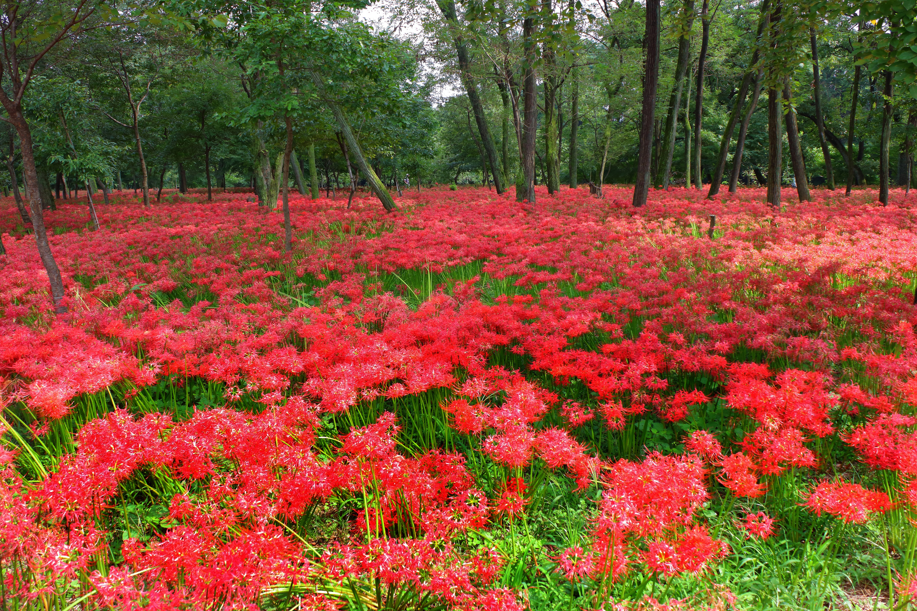 彼岸花（曼珠沙華）- 埼玉県日高市「巾着田」